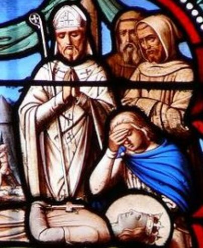 Geoffroy de Beaulieu, à la mort du roi saint Louis à Tunis (1270), vitrail de la cathédrale de Senlis.